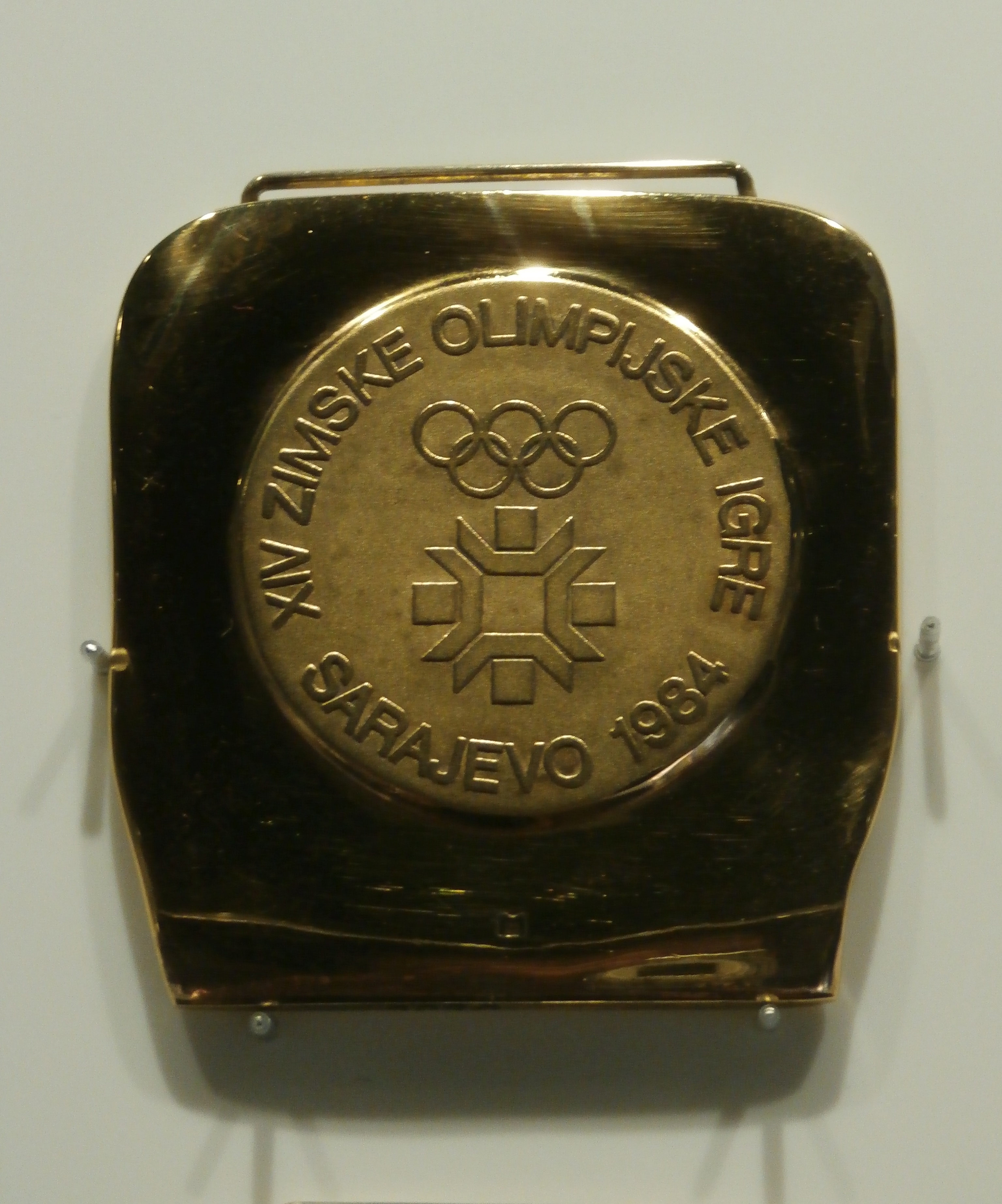 La médaille d'or des Jeux olympiques d'hiver de 1984 au musée olympique, à Lausanne (Suisse).